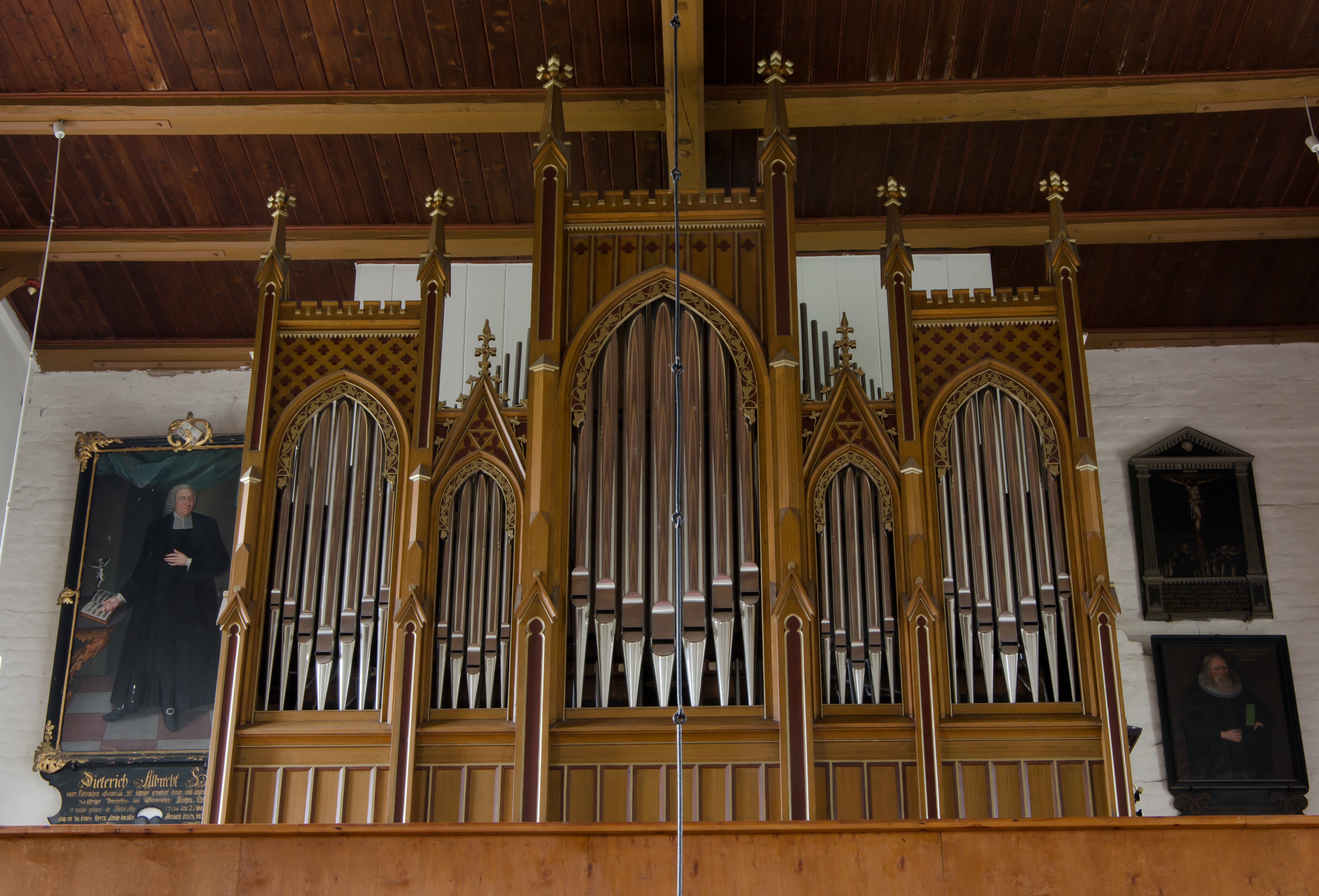 St.Godehard Kessin, Orgel